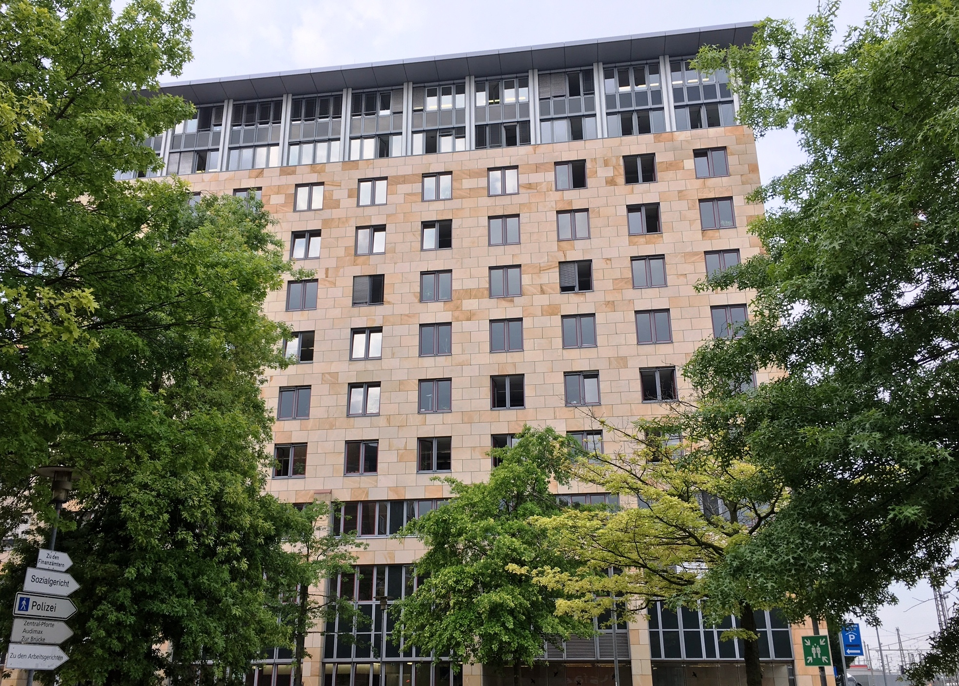 Die Frankfurter Außenstelle des Regierungspräsidiums Darmstadt im Behördenzentrum unweit des Hauptbahnhofs.